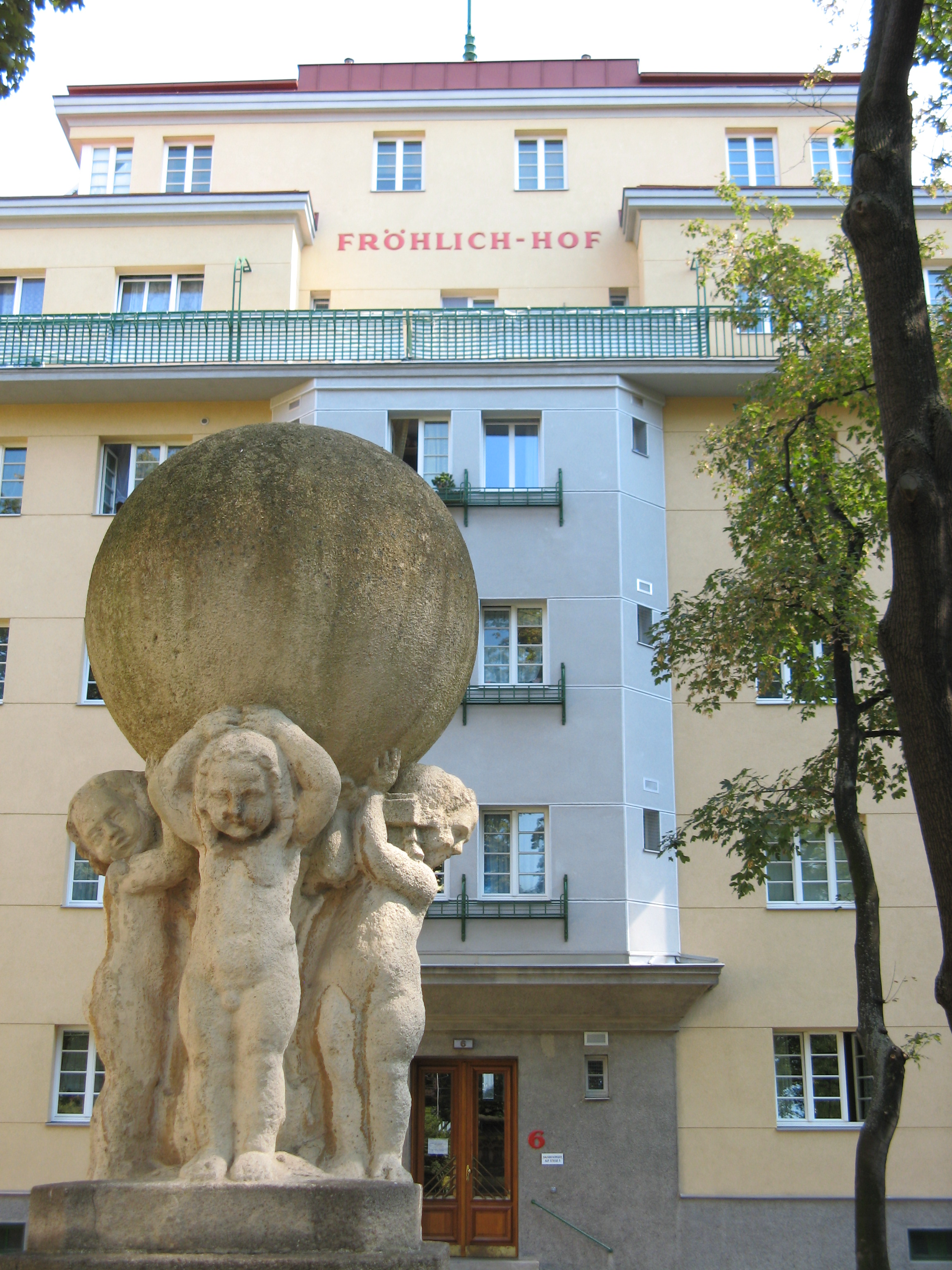 Fröhlichhof (1928-29) von Engelbert Mang mit Brunnen